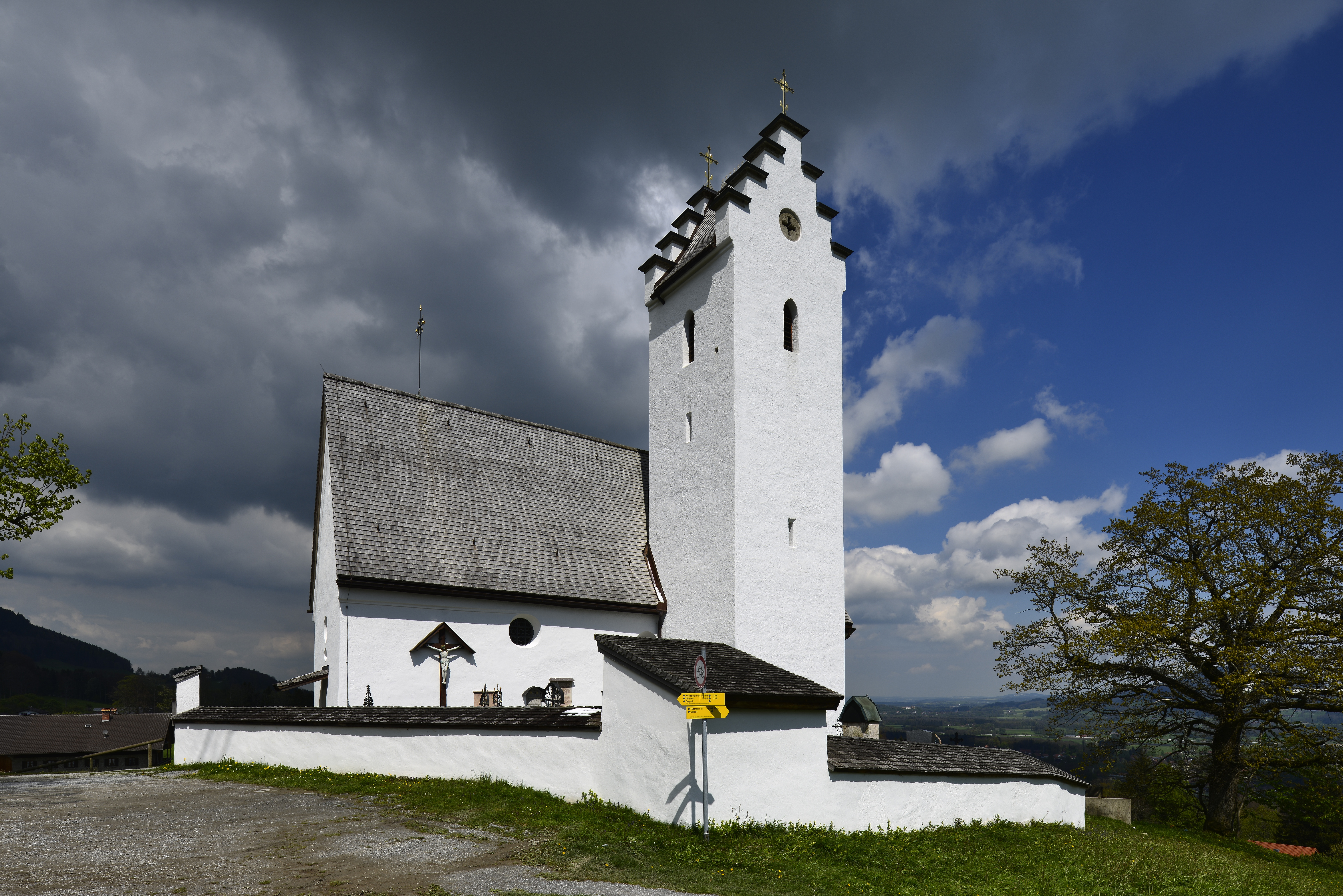 Bayern, Oberbayern, Fassadenansicht Sankt Margarethen (Gemeinde Brannenburg), Ansicht der Filialkirche Sankt Margaretha von Südwesten.